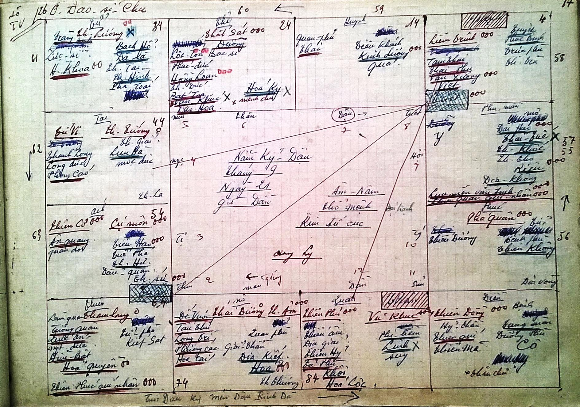 D S Chu2